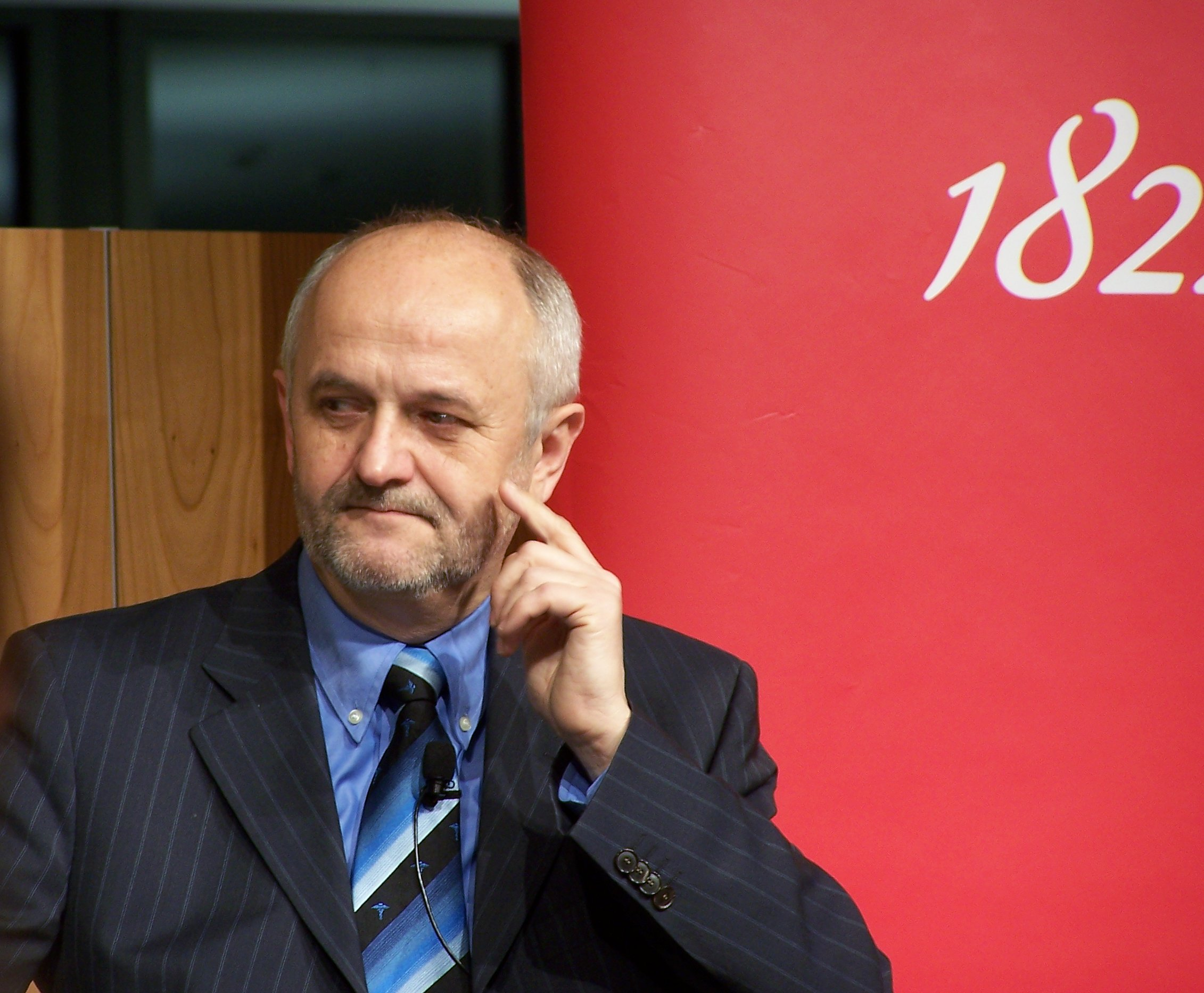 Oberbürgermeisterkandidat Franz Frey (SPD) bei einer Podiumsdiskussion der Frankfurter Rundschau in der Schalterhalle der Frankfurter Sparkasse (Filiale Neue Mainzer Straße).